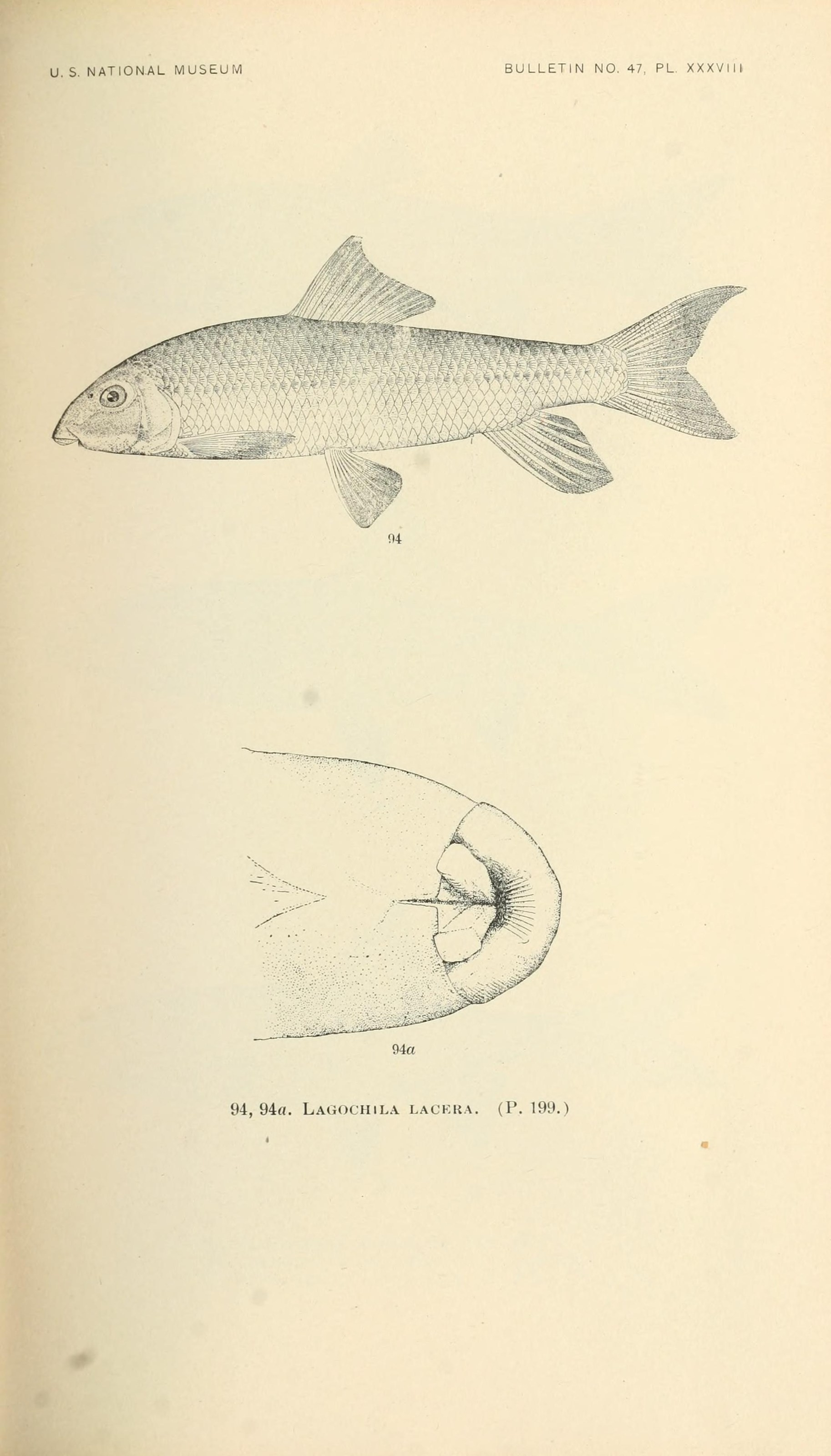 U. S. NATIONAL MUSEUM BULLETIN NO. 47, PL. XXXVIU 94a 94, 94«. Lagochila lackk.x. (P. 199.)